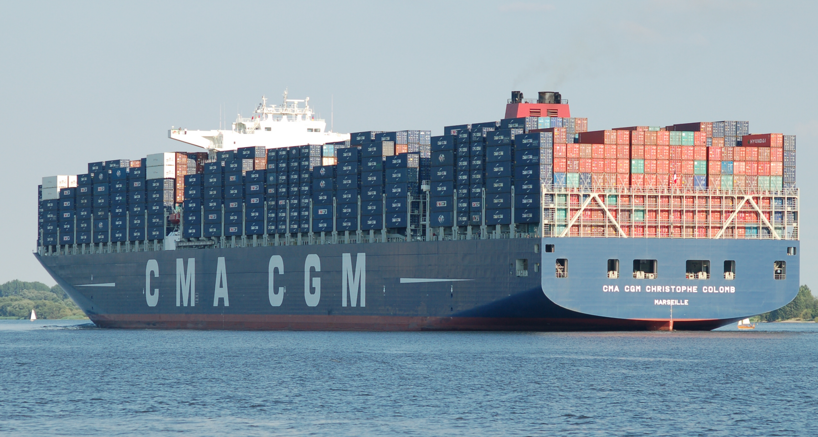 Das Containerschiff CMA CGM Christophe Colomb auf der Elbe bei Wedel. IMO-Nummer: 9453559 MMSI-Nummer: 228315600 Rufzeichen: FNUY Länge: 365.0m Breite: 52.0m Flagge: Frankreich